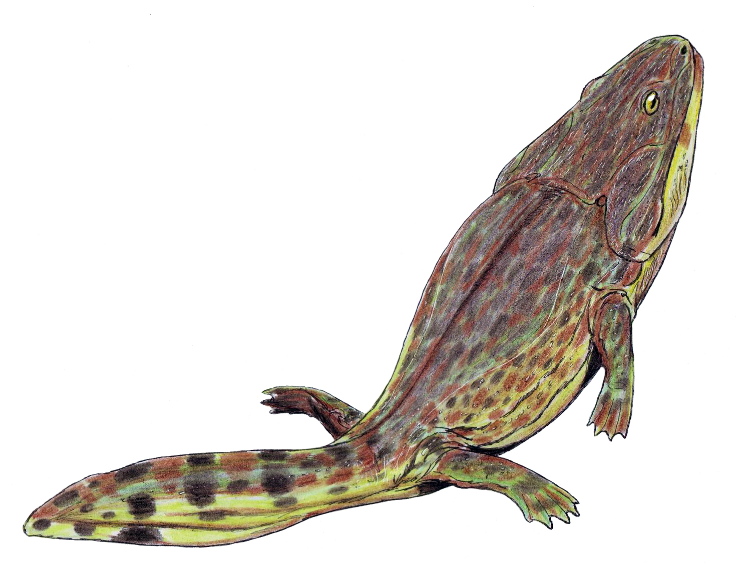 Koskinonodon (formerly Metoposaurus) bakeri